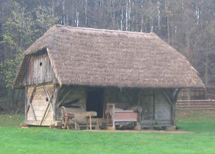 Quelle: eigene Aufnahme 09. Nov. 2005 Fotograf: Janez Novak, Ljubljana, Slovenija